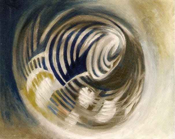 Rotation, 80x100